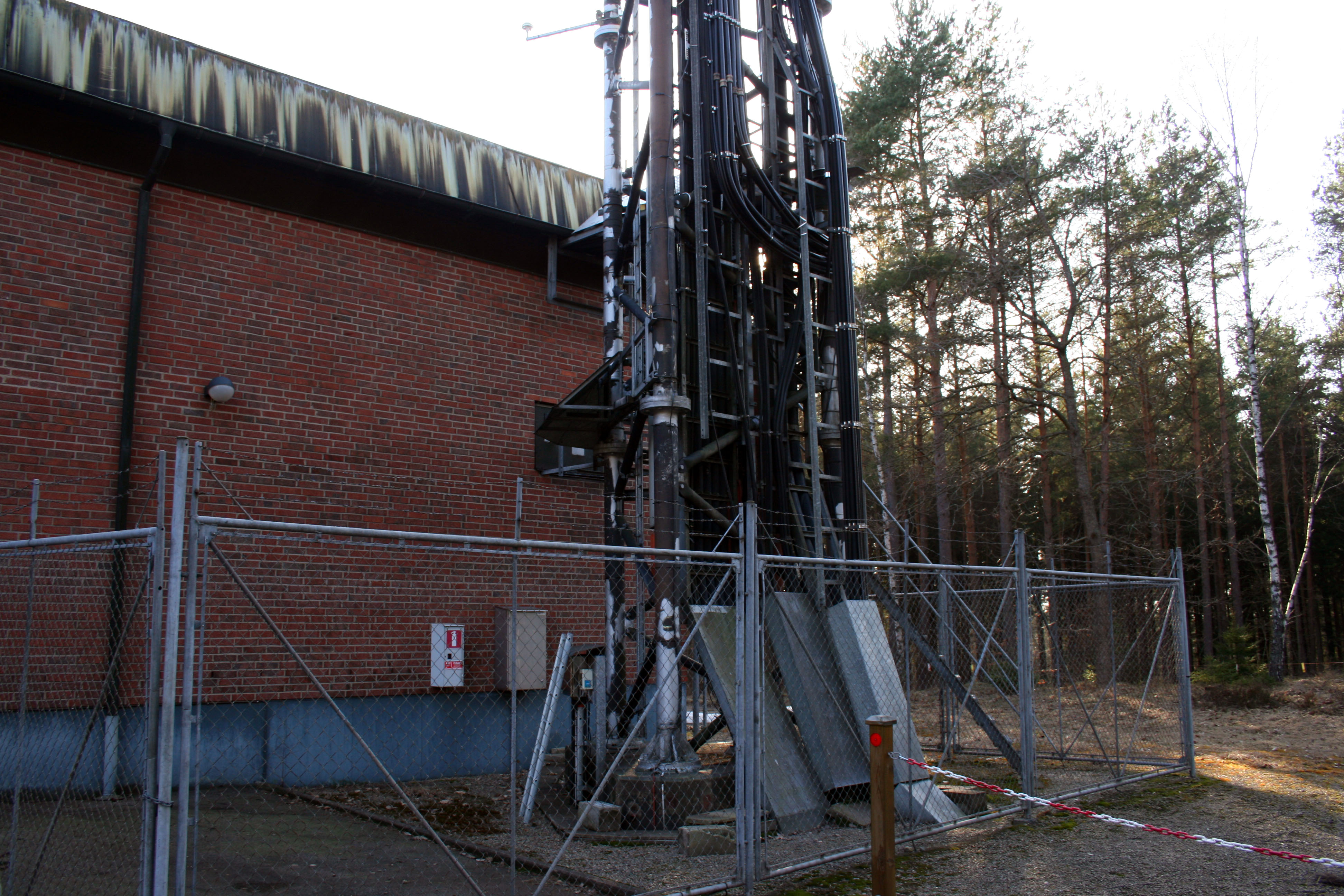 Gungvalamasten i Gungvala, Karlshamns kommun